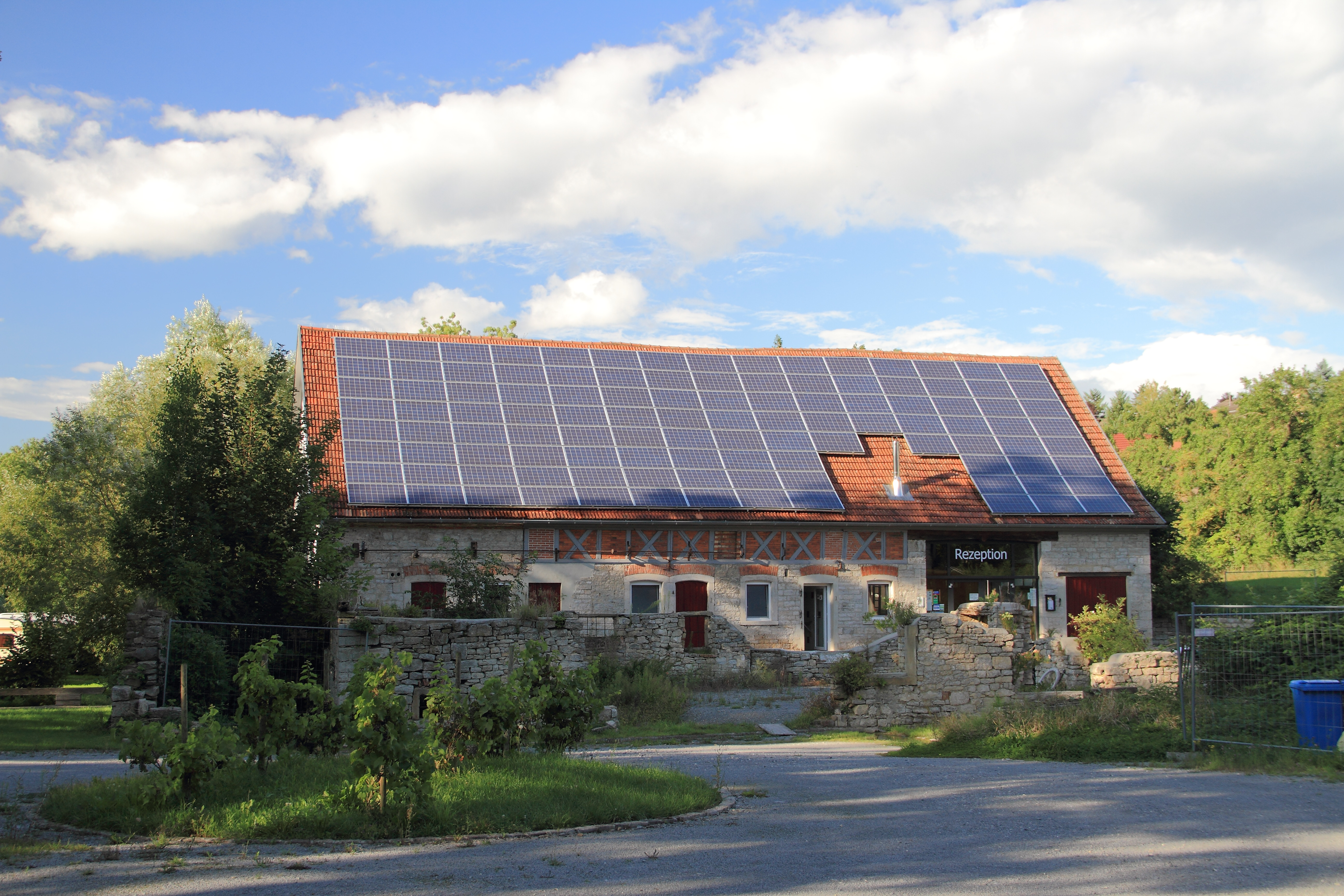 Die Schwabenmühle in Weikersheim-Laudenbach ist inzwischen die Rezeption eines Campingplatzes.